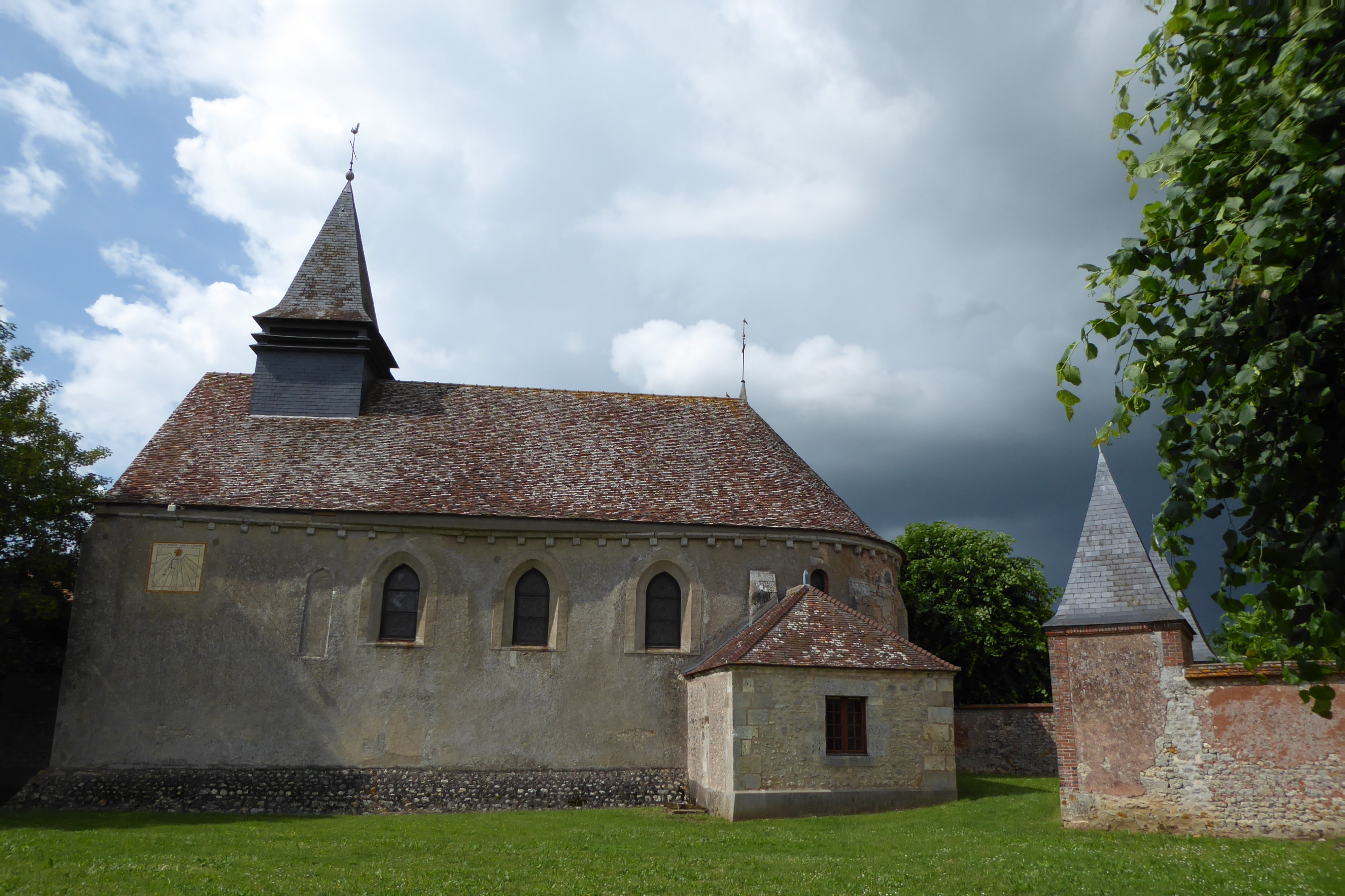 église Notre-Dame, Villars, Eure-et-Loir, France.